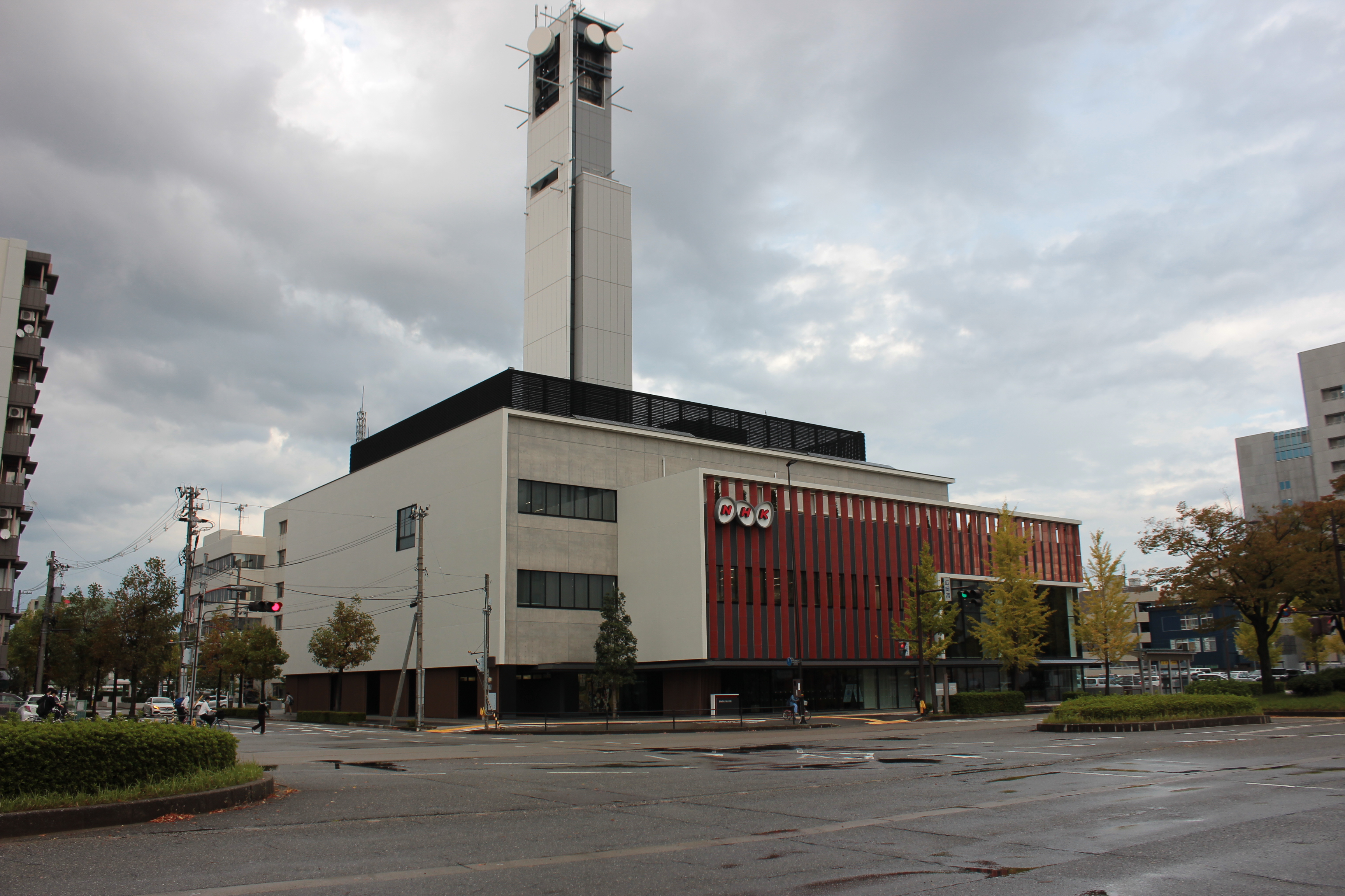 NHK金沢放送会館（2018年竣工） Canon EOS Kiss X5